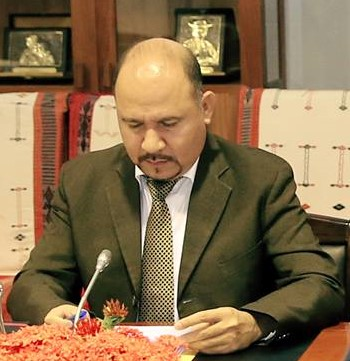 Manuel Serrano beim Konsellu Superior Defeza no Seguransa